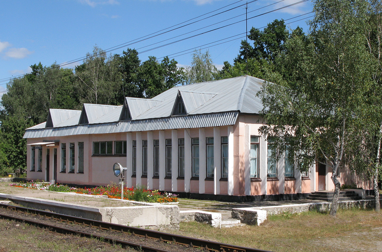 Вокзал станції Сокорики